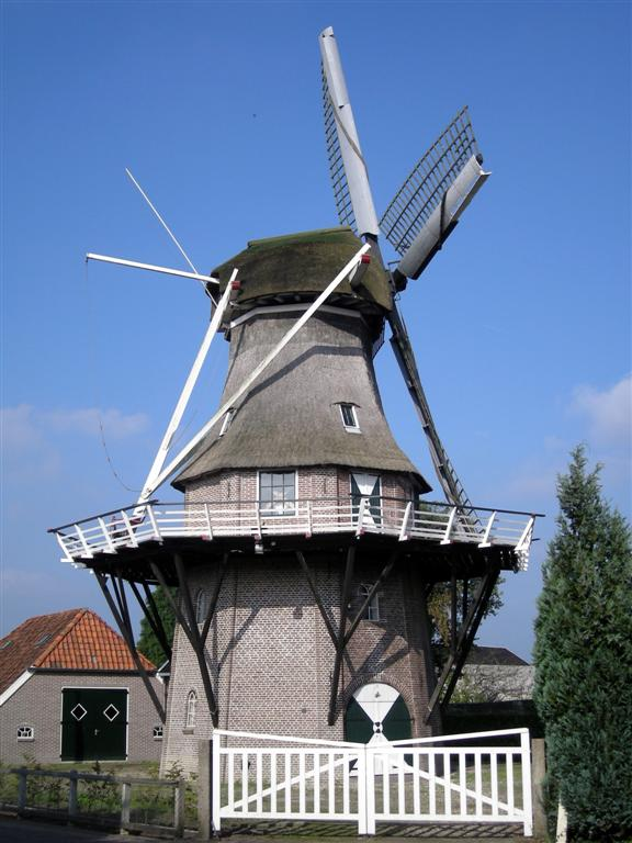 Windlust, molen in Noordwolde (windmill)